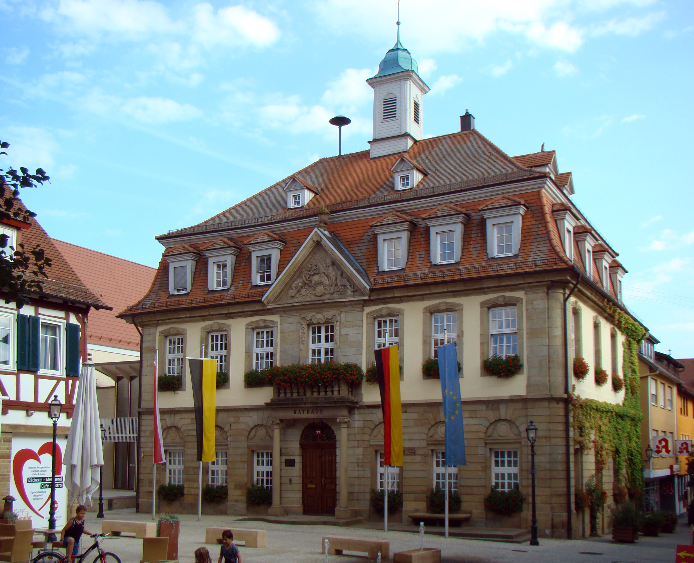 Rathaus in Brackenheim